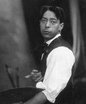 Julián Tellaeche ca. 1910